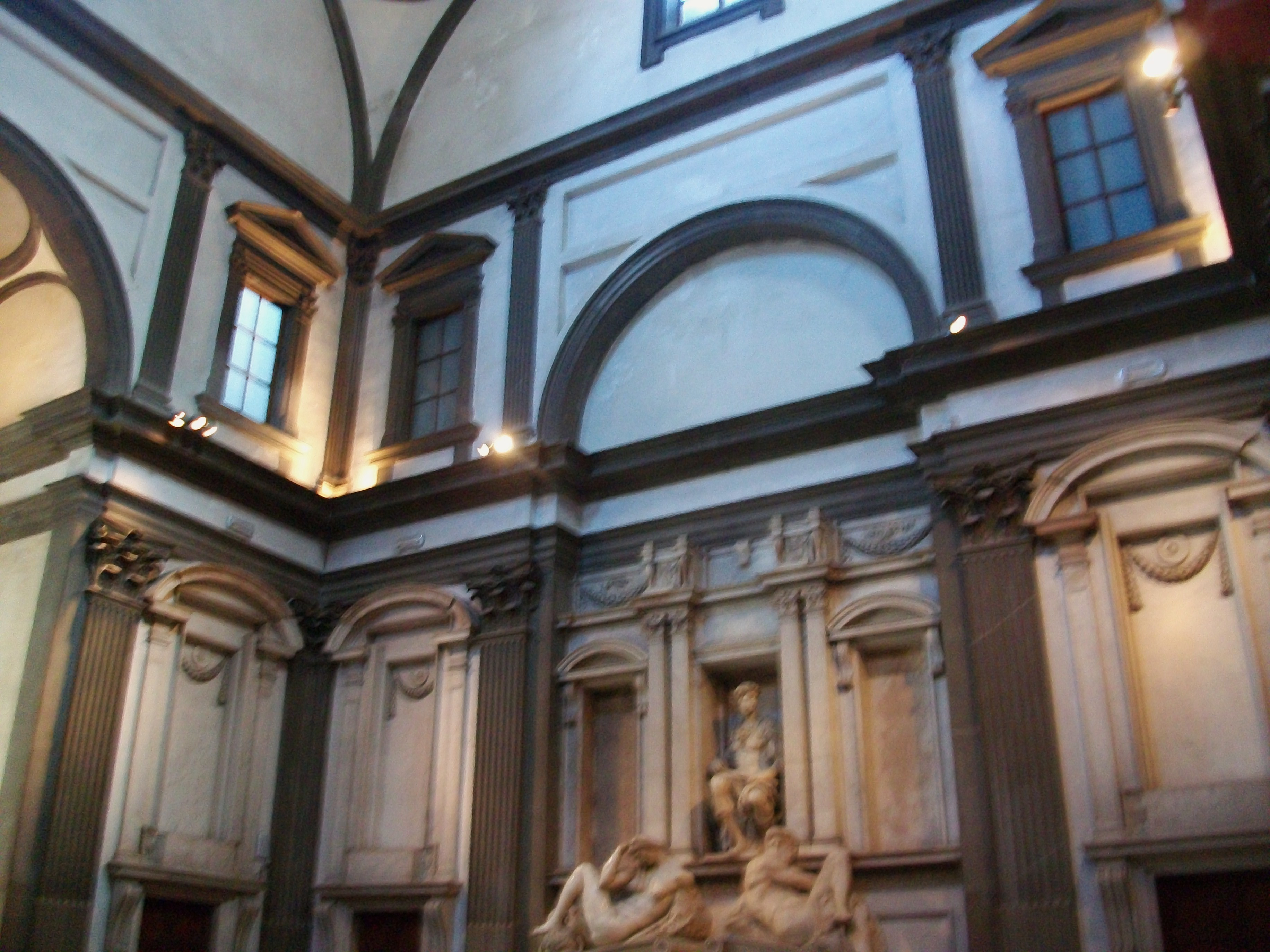 Sagrestia Nuova, Michelangelo.